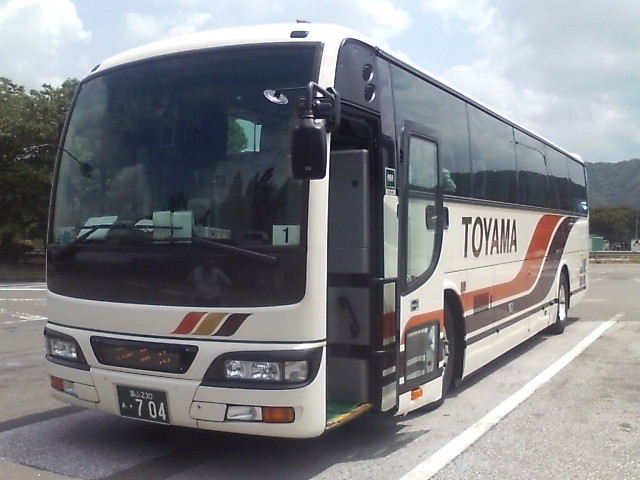 大阪－砺波・富山線など中長距離路線で使用される富山地鉄のスペースアロー。神田パーキングエリアで休憩中。